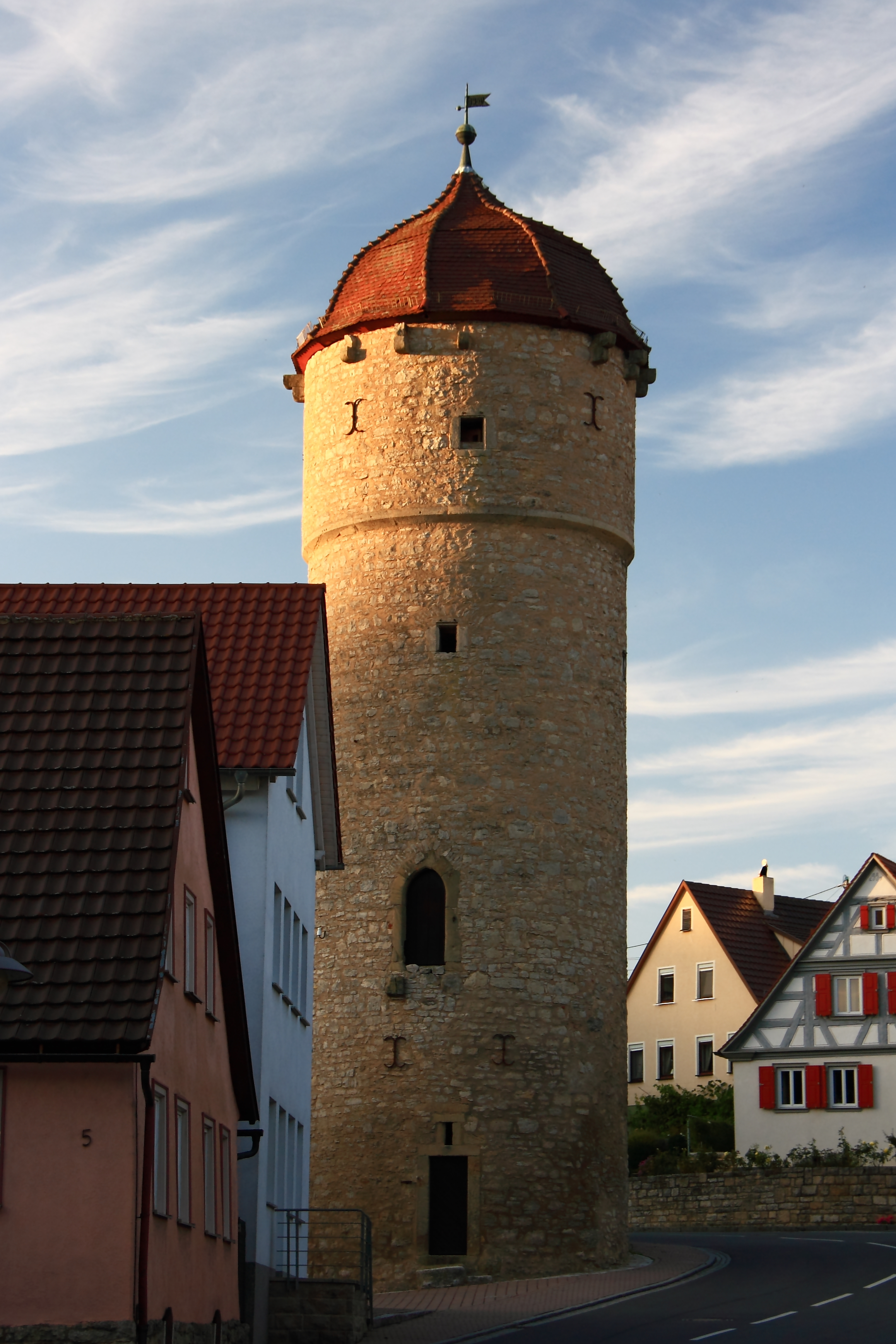 Weikersheim-Laudenbach. Der Herkelsturm ist ein runder Stadtturm aus dem 15. Jh.